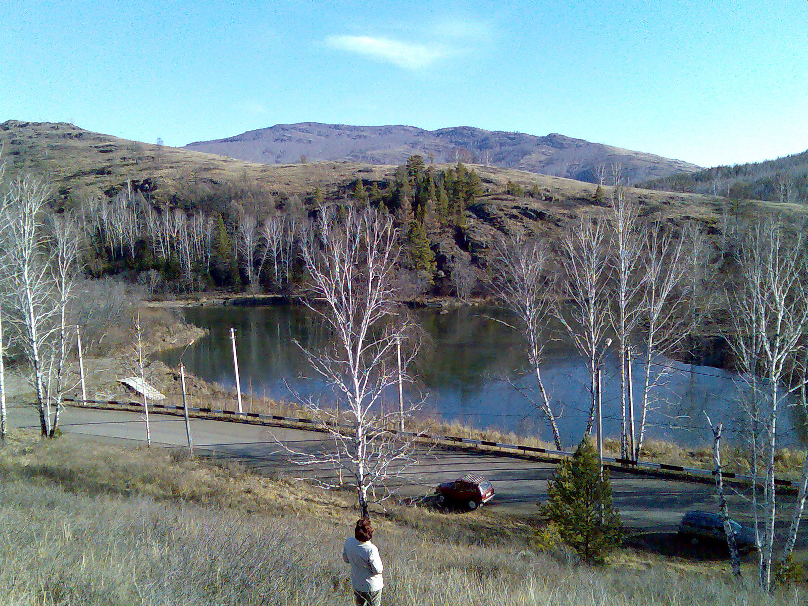 Запруда на М.Кизиле